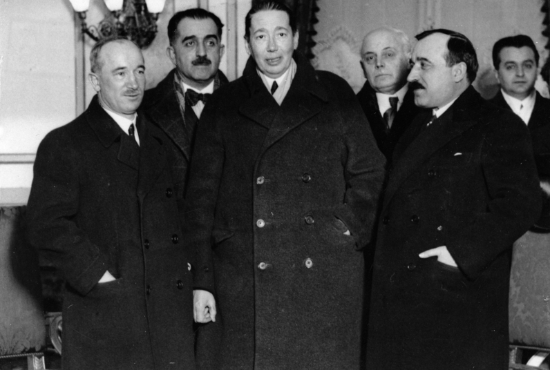 Die Konferenz der Minister der kleinen Entente in Belgrad. Die Minister nach der Konferenz. Von links nach rechts: Dr. Eduard Benesch, der tschechoslowakische Aussenminister, der rumänische Aussenminister Nikolaus Titulescu und der jugoslavische Aussenminister Bogolyub Jevtitsch [Jeftitsch]. 11288-32 Information added by Wikimedia users.